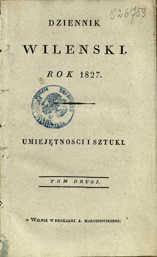 Dziennik Wileński. Umiejętności i Sztuki. 1827, T. 2, październik (okładka)